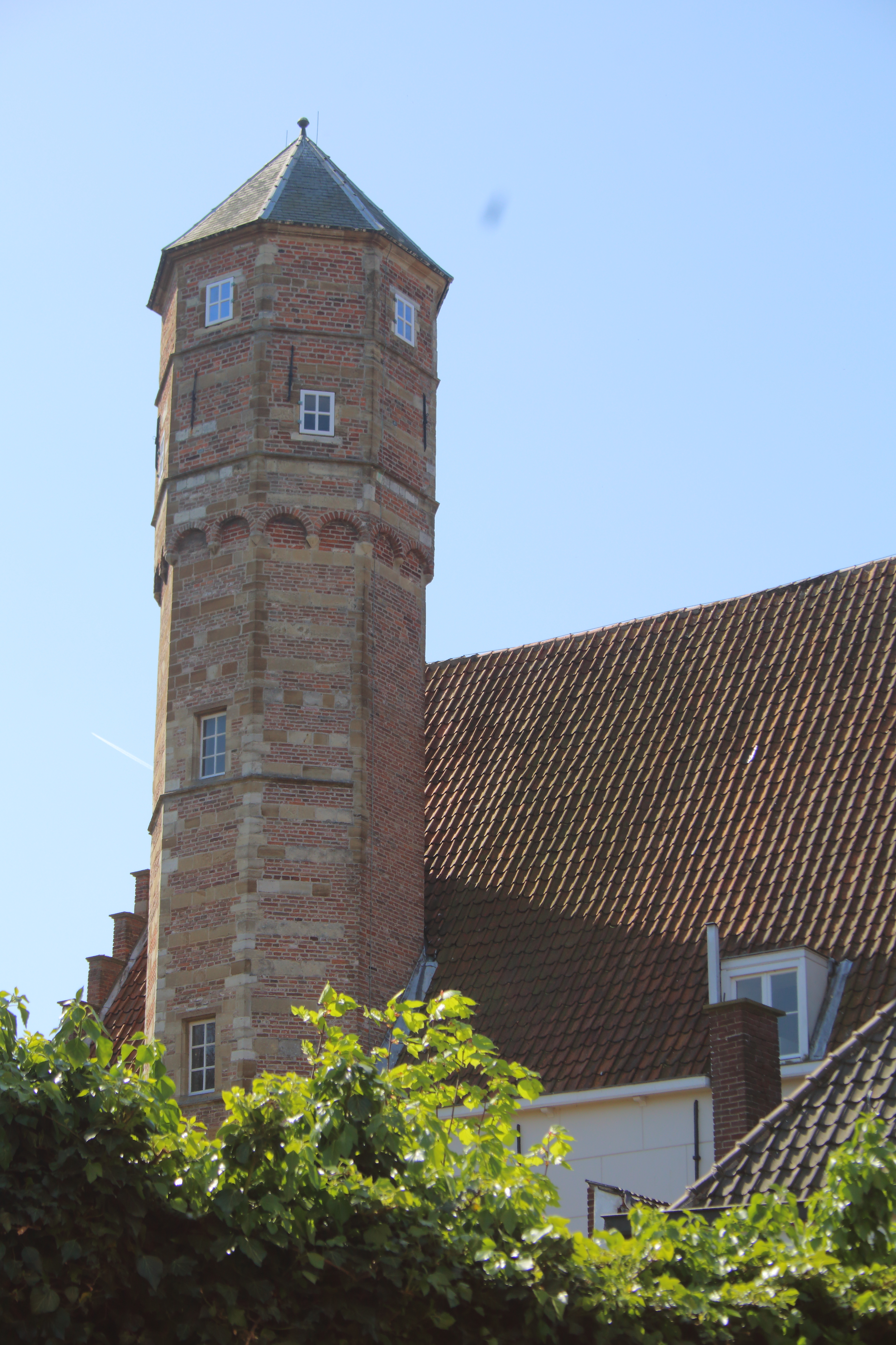 Refugiehuis Ten Duinen, Hulst, Zeeuws-Vlaanderen, Zeeland, Nederland